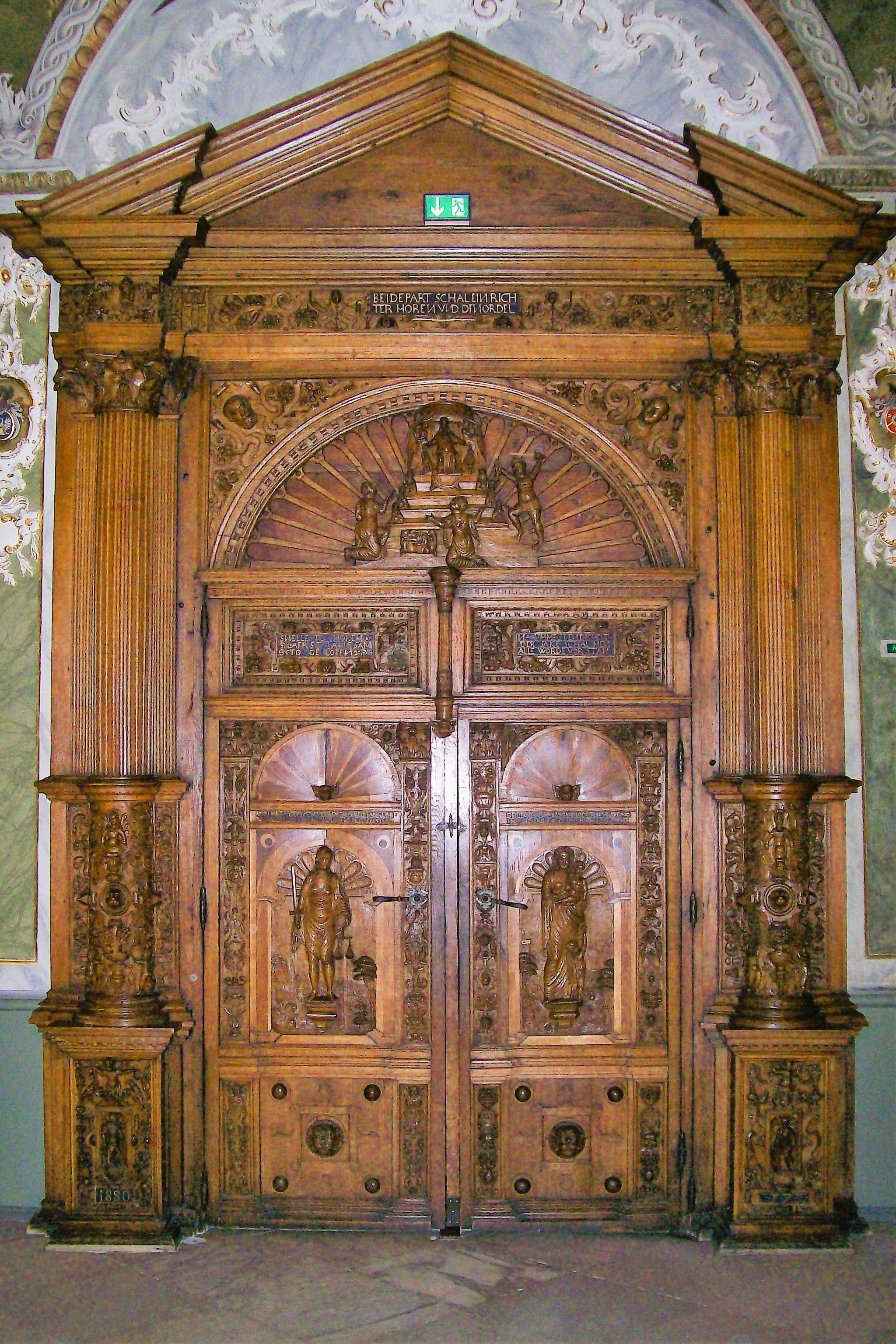 Portal des Audienzsaals des Lübecker Rathauses im Stil der Renaissance, geschaffen 1574 von Tönnies Evers dem Älteren